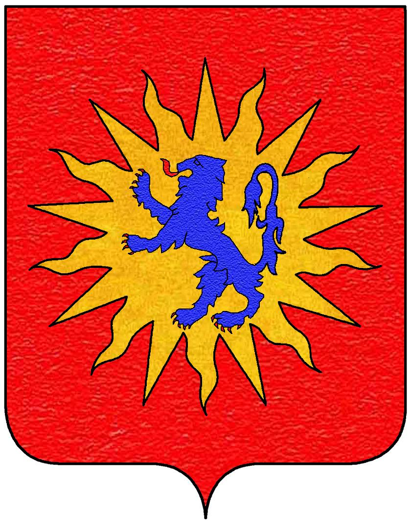 Stemma della famiglia Caracciolo del Sole